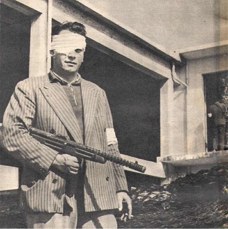 Membro del governo provvisorio sammarinese a Rovereta nell'ototbre 1957